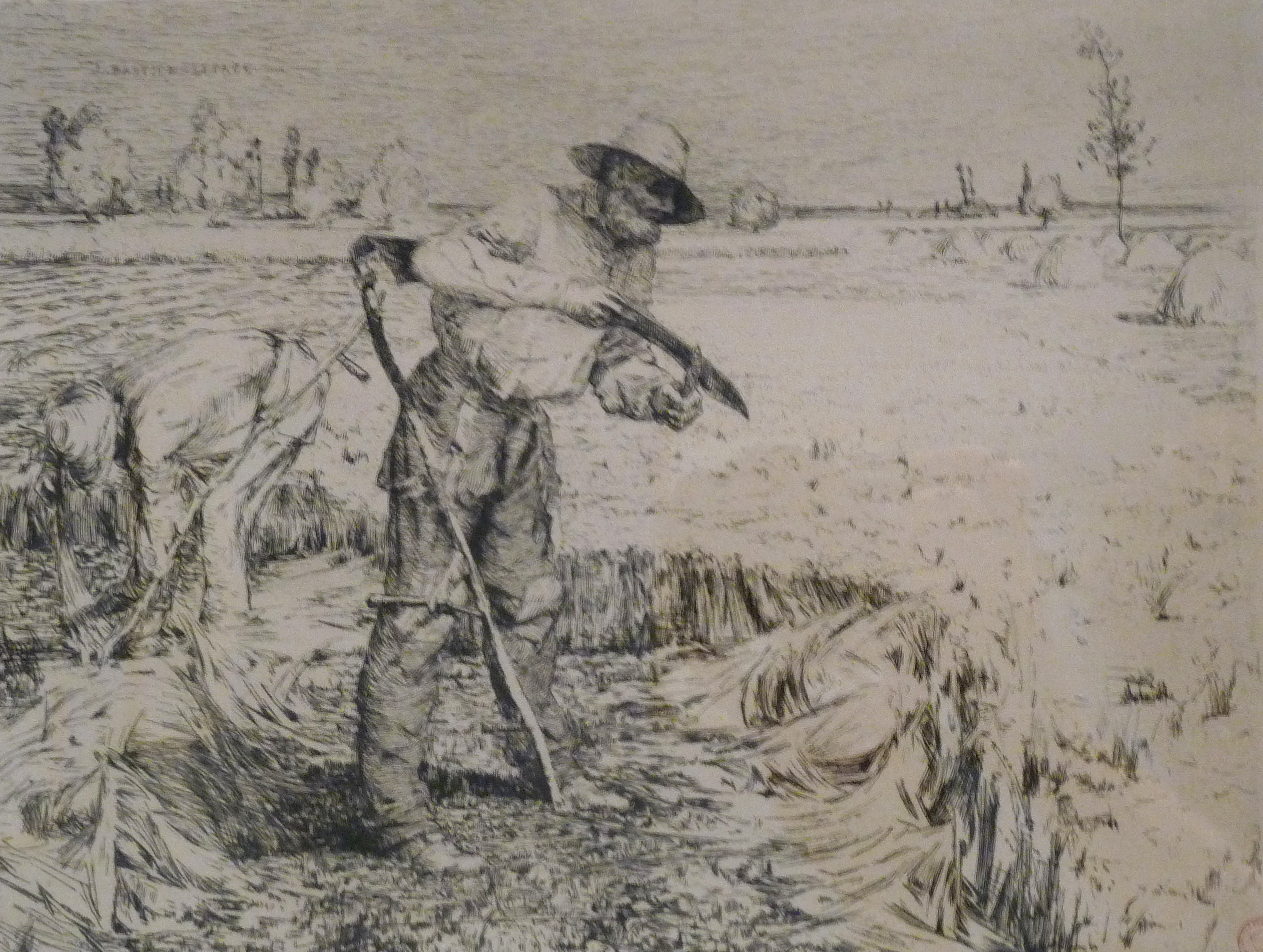 Jules Bastien-Lepage, Les faucheurs, eau-forte sur papier, 1878, Musée d'art moderne et contemporain de Strasbourg